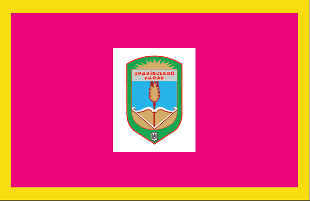 Прапор Драбівського району